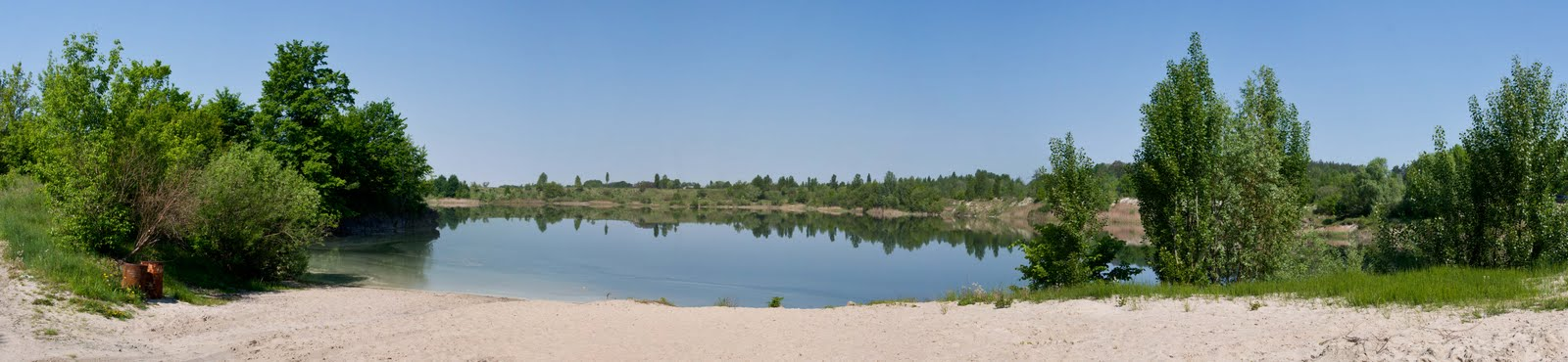 карьер "Калюжа" г.Малин Украина